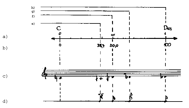 Interpolatsioon matemaatikas ja muusikas: a) vahemik 0 (C) … h) 1 (Des) või b) 0 (centi) … 100 (centi) on "täidetud" c) kolme mikrointervalliga: e) 31-helilise helirea viiendiktooni, f) võrdtempereeritud süsteemi veerandtooni ning g) võrdtempereeritud süsteemi kolmandiktooniga. Näite osas d) on ühe kaheksandiku pikkune kestus "täidetud" vastavalt e) ca ühe kvintooli kuueteistkümnendiku, f) ühe kuueteistkümnendiku, g) ühe triooli kaheksandikuga. Interpoleeritud helikõrgused ja kestused on valitud improviseerides